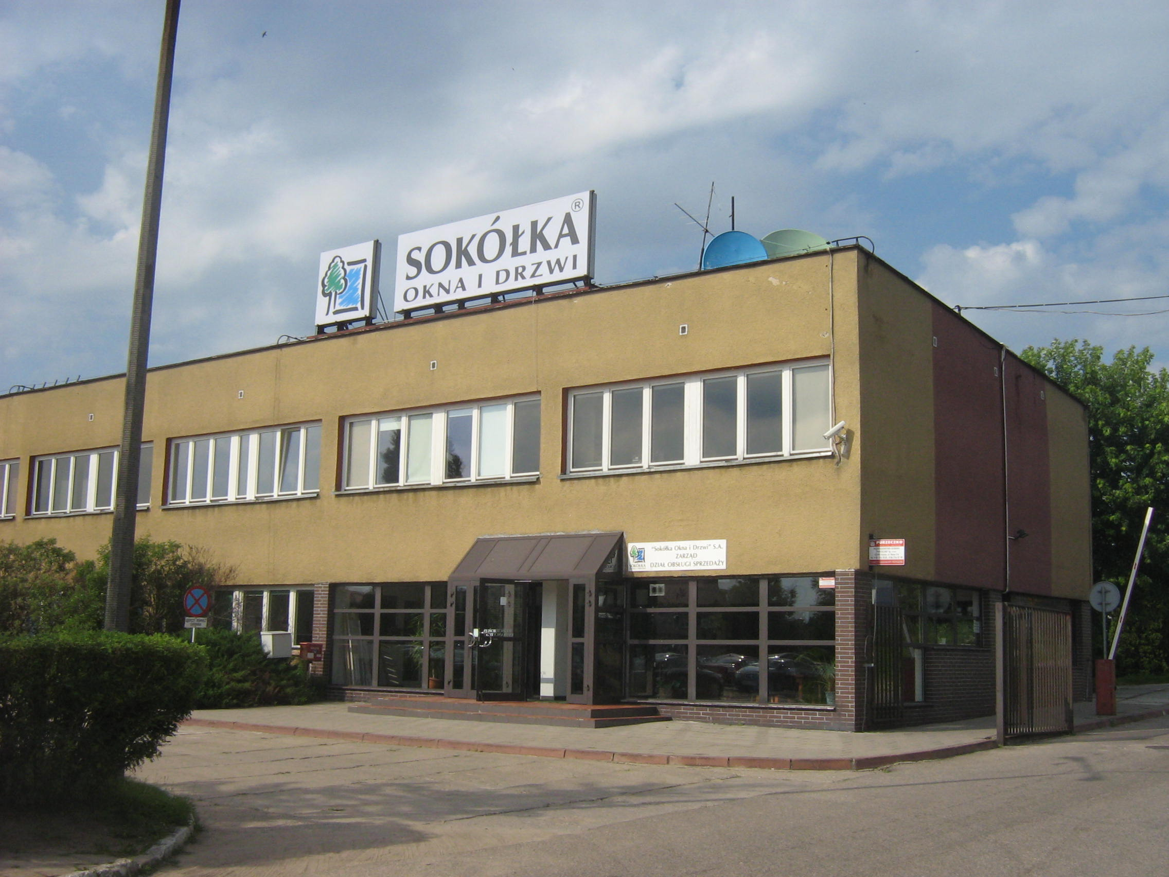 Fabryka Okien i Drzwi "Sokółka" w Sokółce.